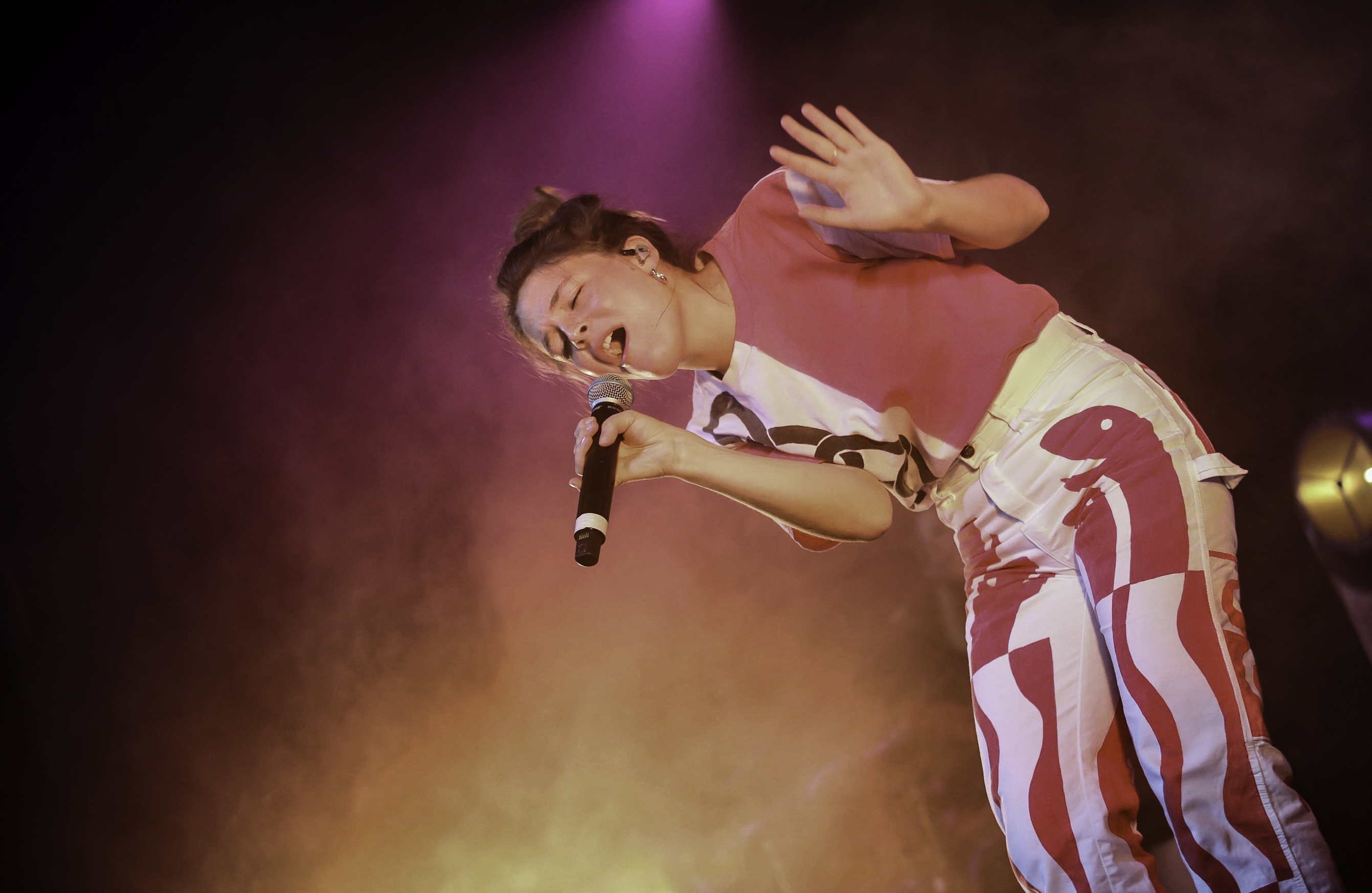 Maggie Rogers - First Avenue - Minneapolis